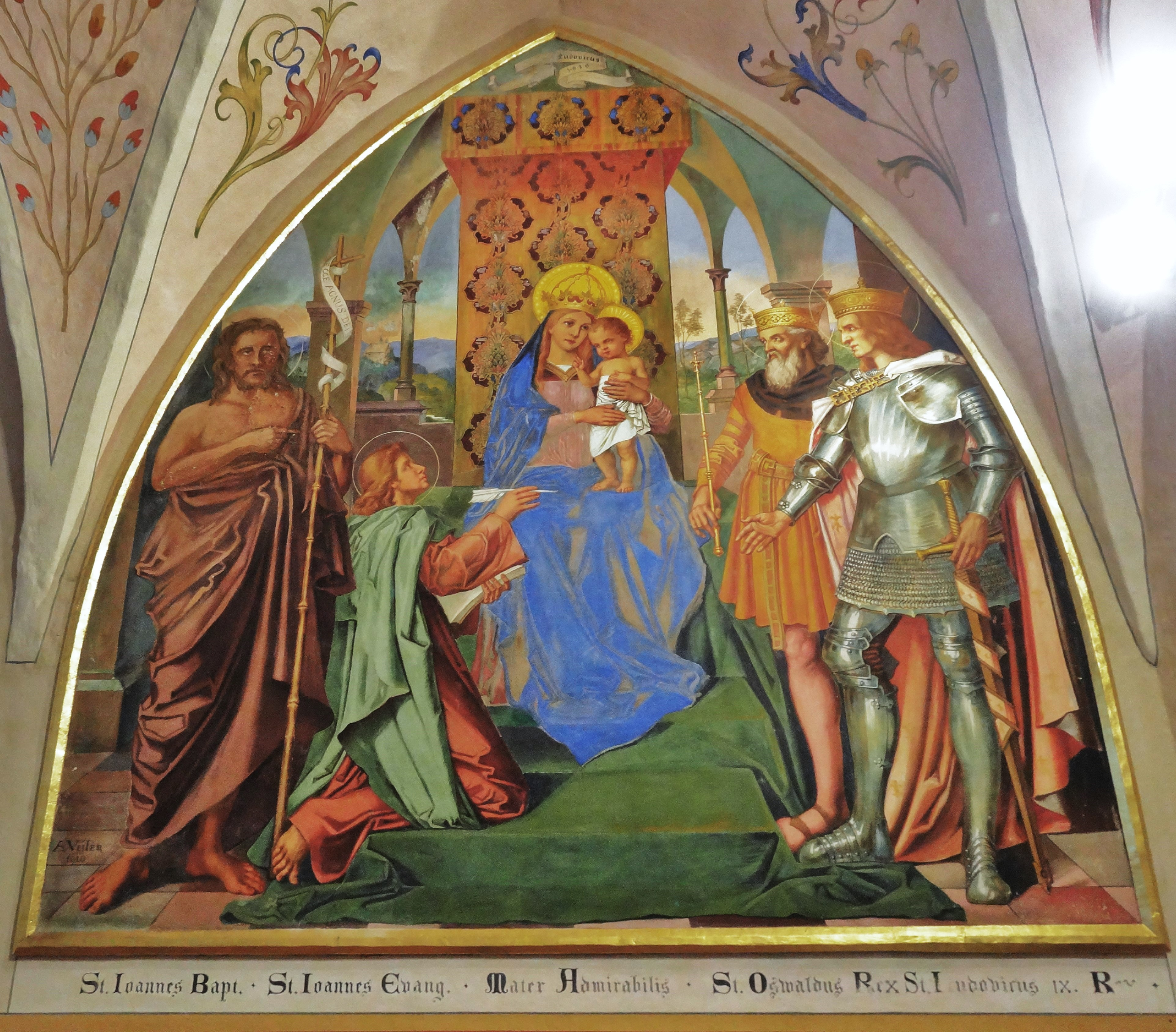 Madonna mit Heiligen, eine Sacra Conversazione, im Chor der kath. Filialkirche Flattnitz